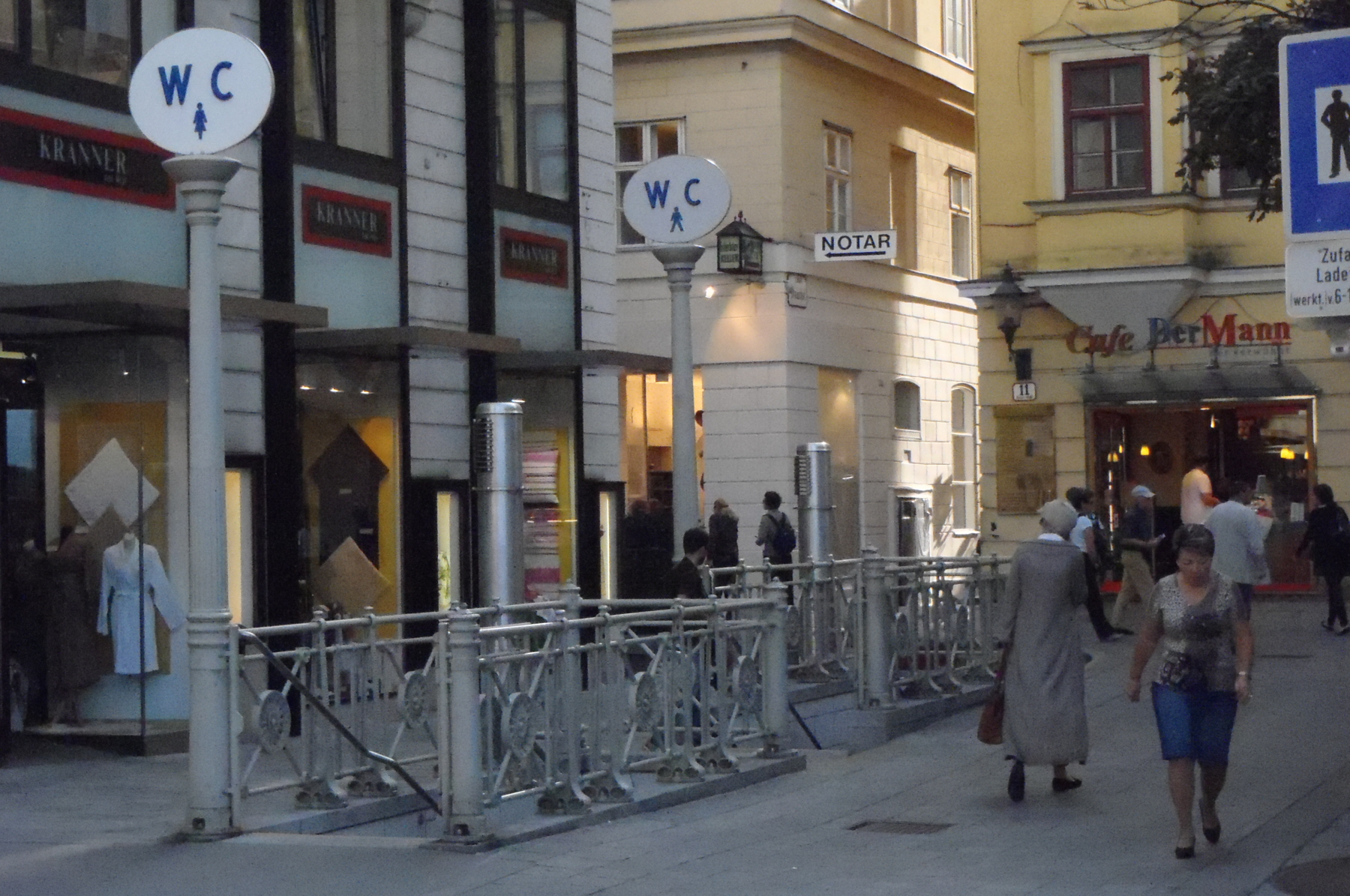 Unterirdische Bedürfnisanstalt, Öffentliche WC-Anlage